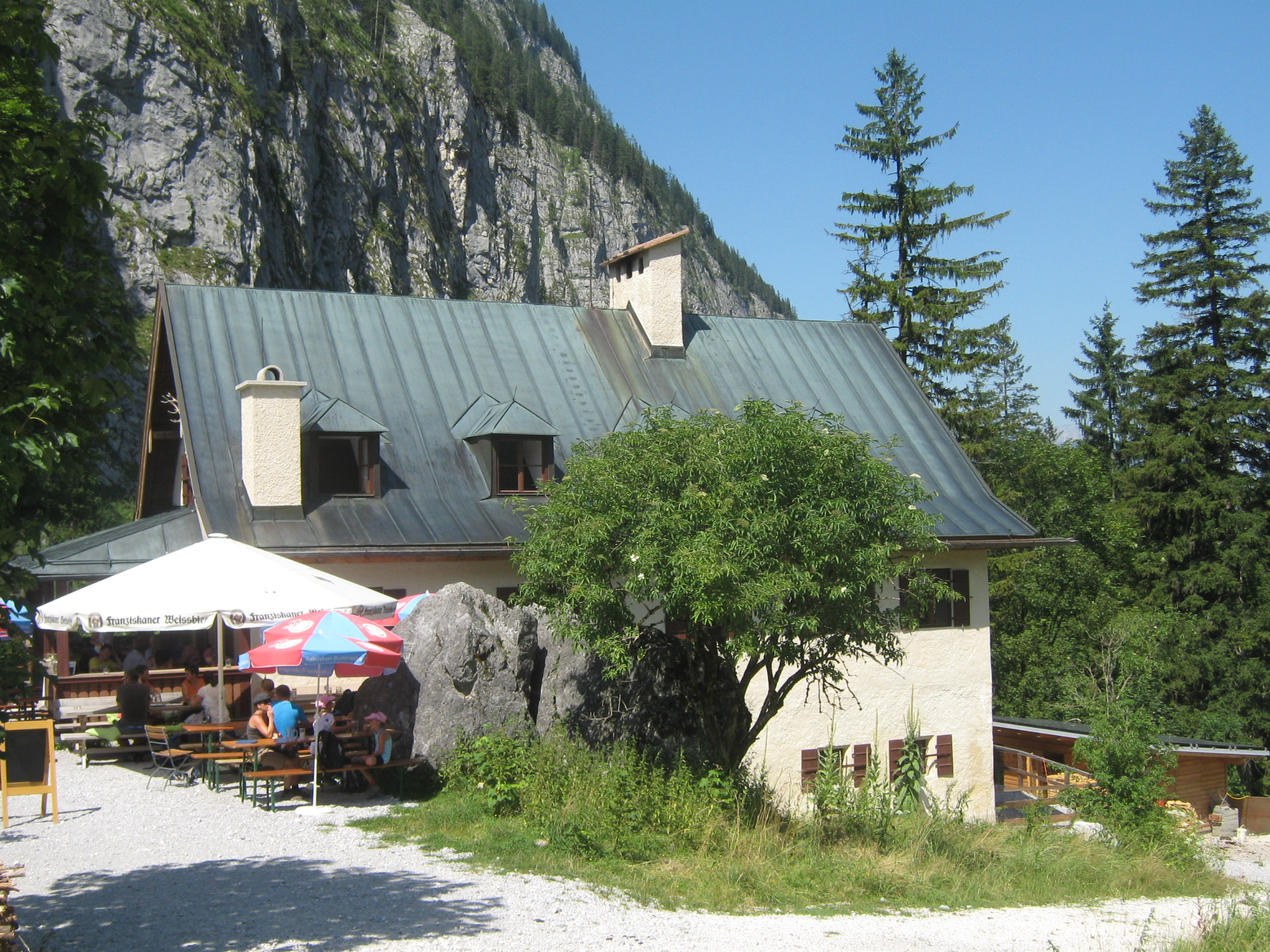 Das Wimbachschloss im Wimbachtal/Wimbachgries bei Ramsau, OberbayernAnsicht von Süden